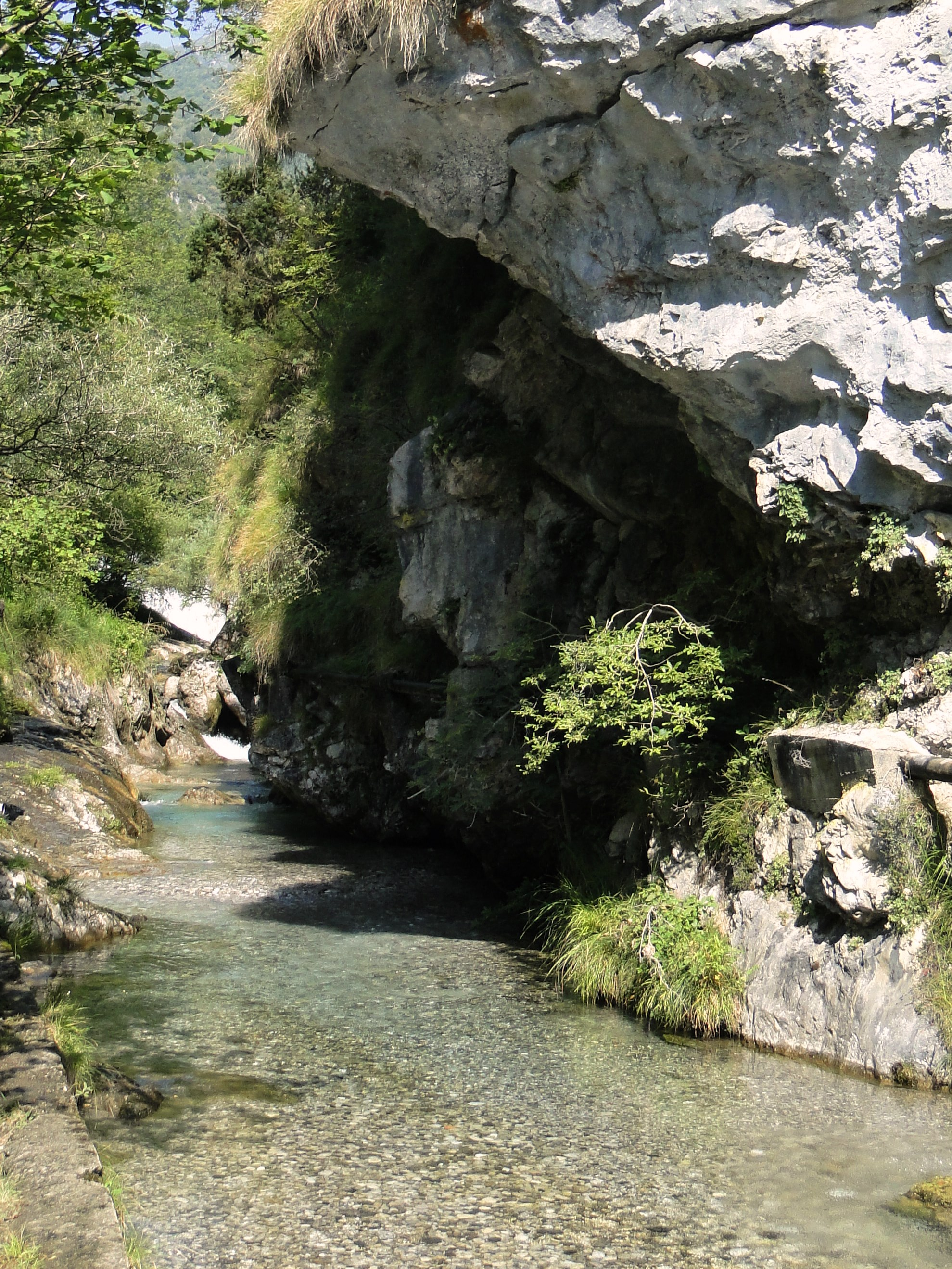 Val Vertova, tributaria della val Seriana (BG).